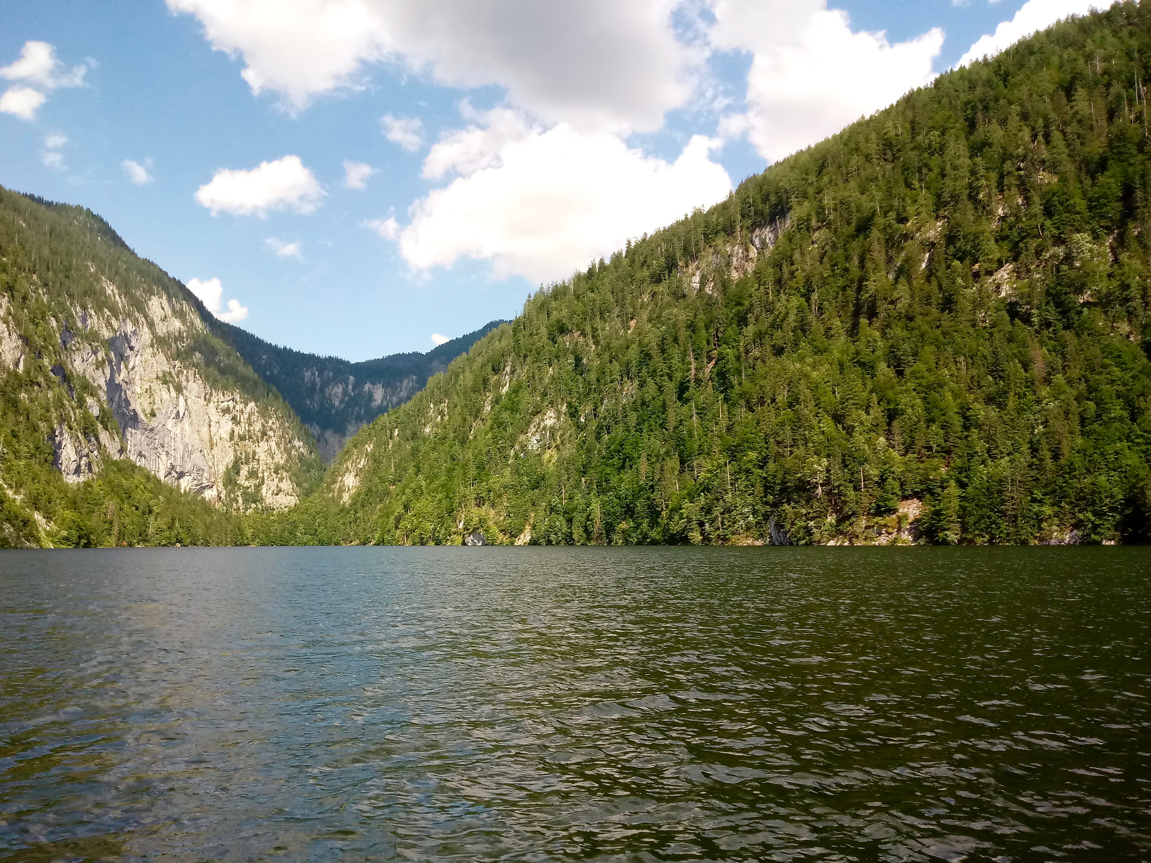 Toplitzsee.